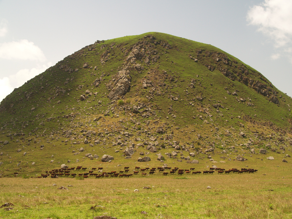 Manengouba Olympus digital camera